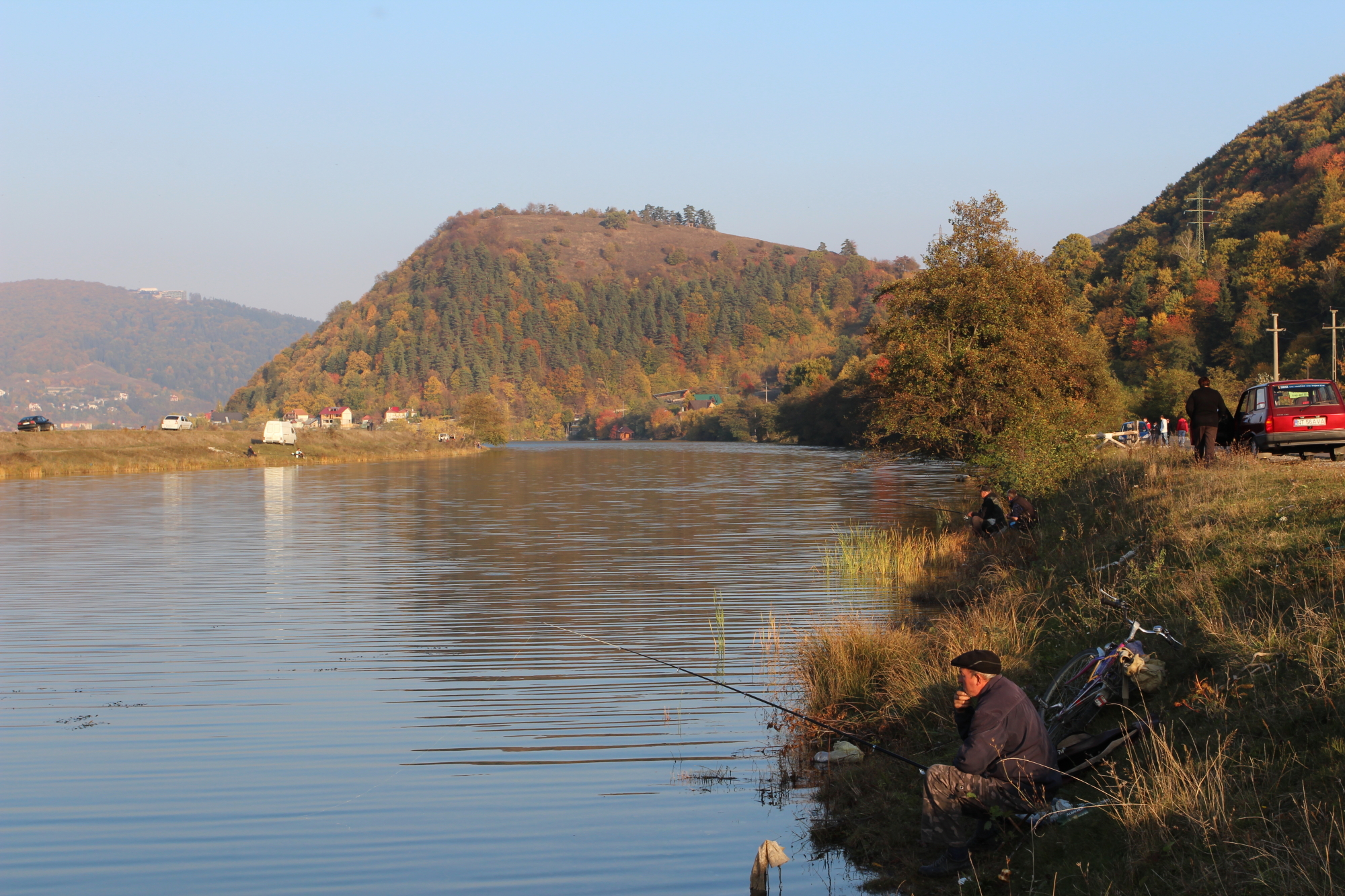 Așezare 01